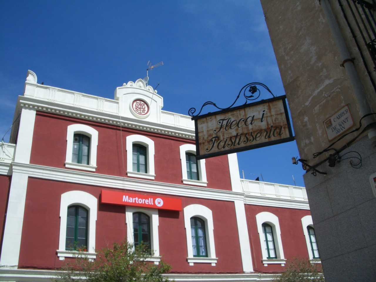 Estación de Martorell.